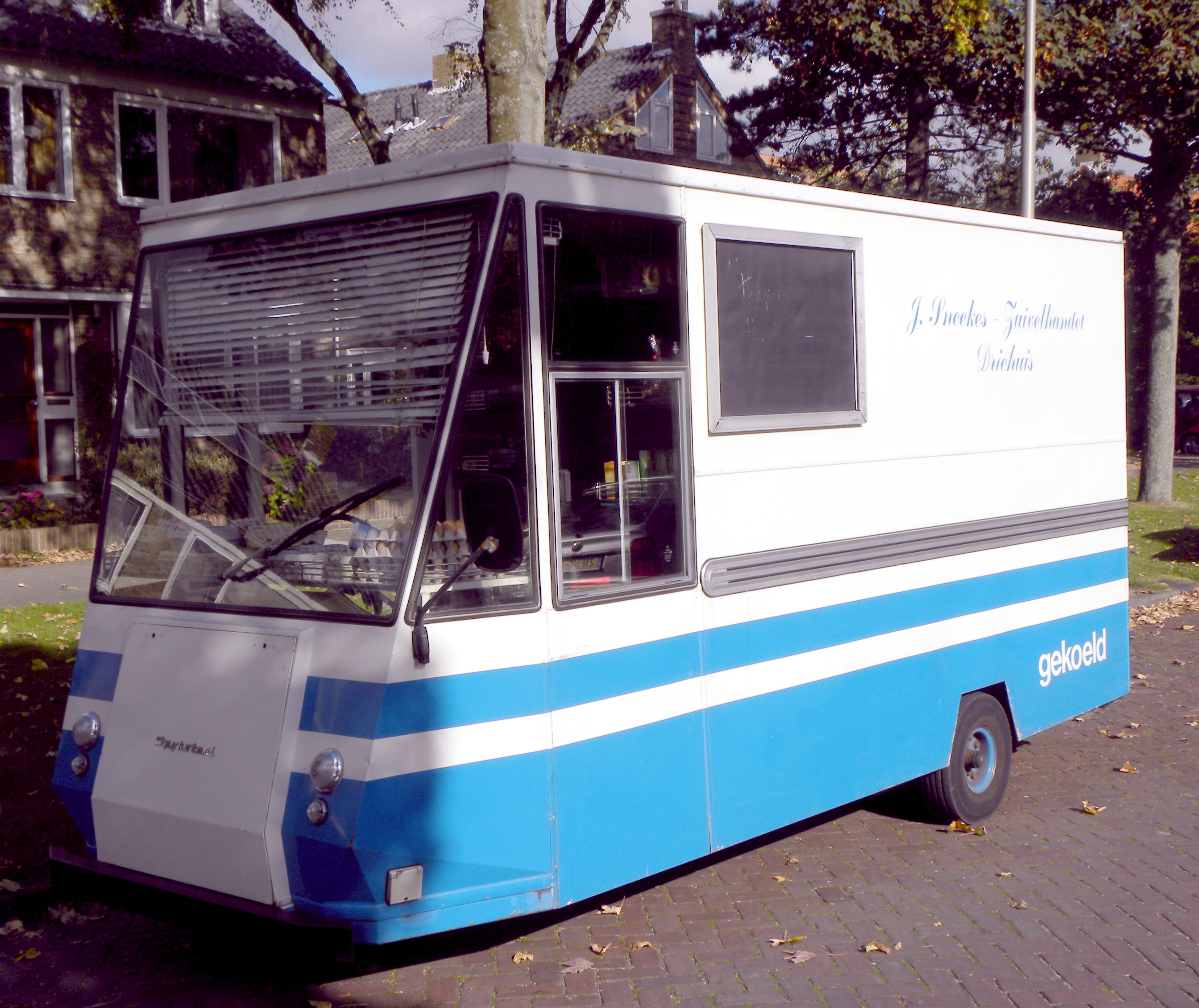 Spijkstaal from 1984